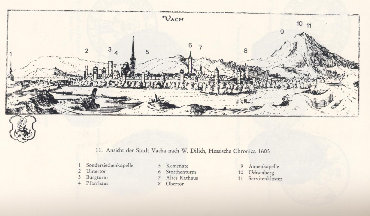 Das Bild zeigt die Westansicht der Stadt Vacha.